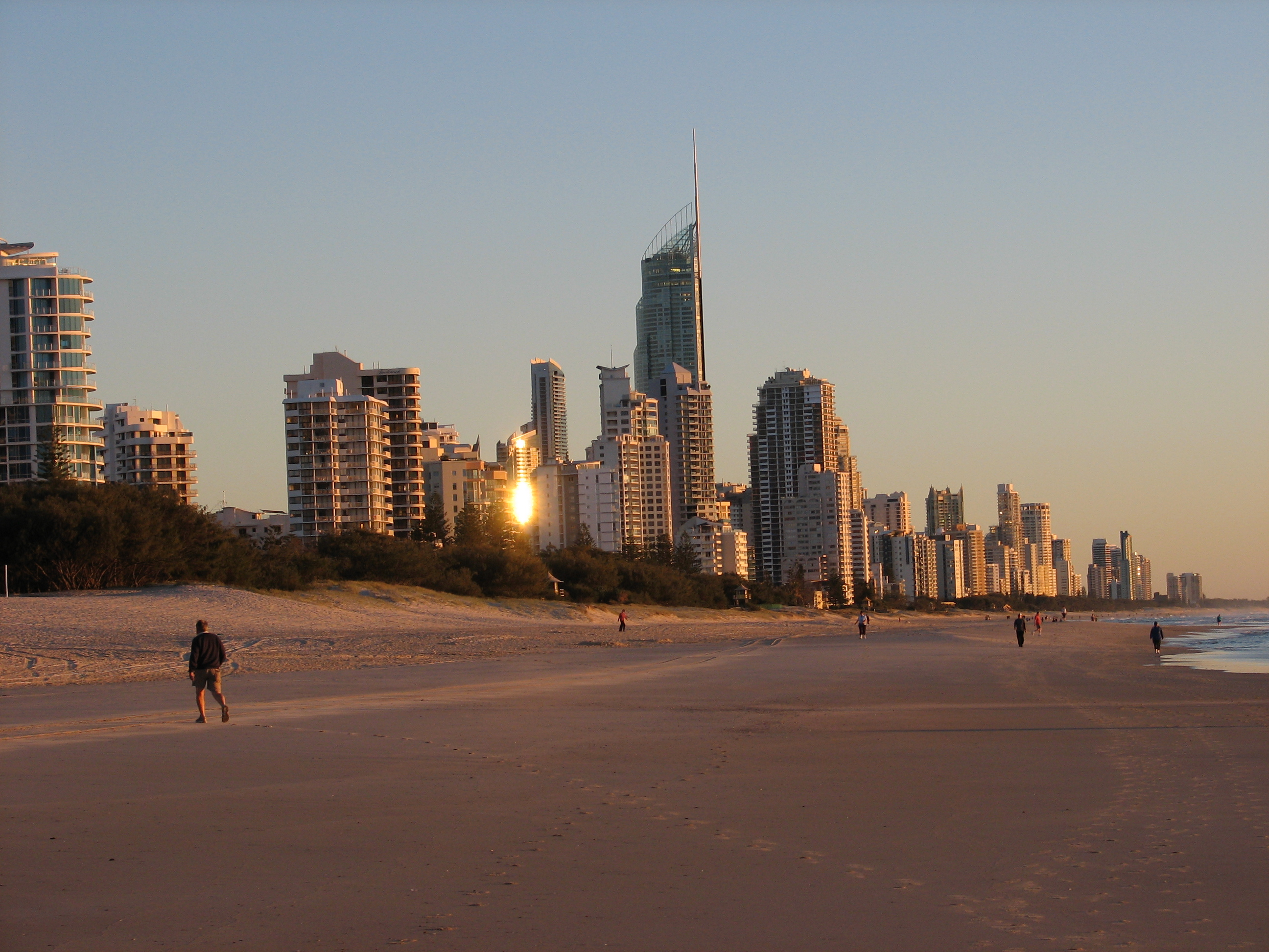 Skyline von Gold Coast (Australien)